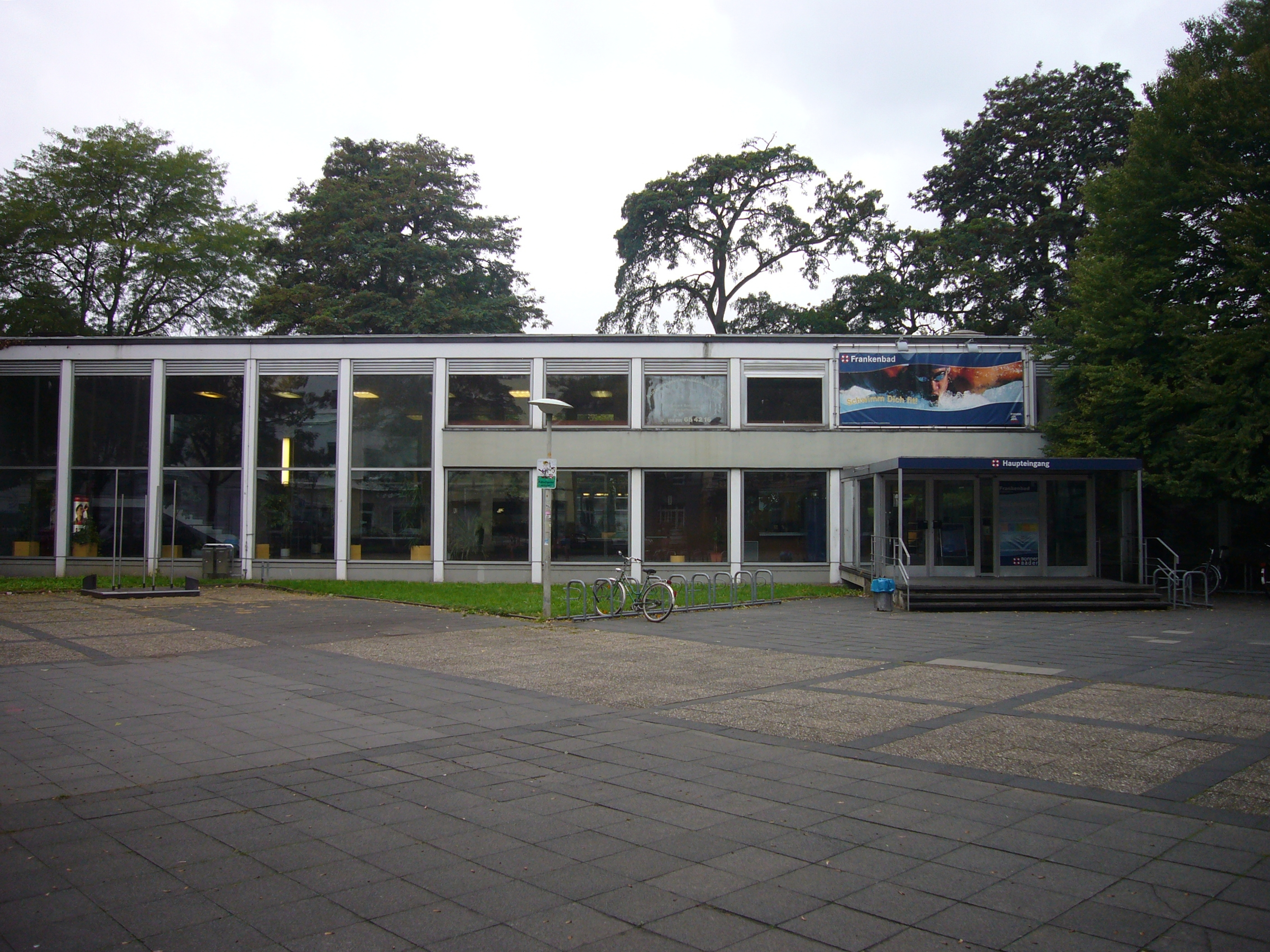 Das Frankenbad in Bonn, hier: Haupteingangsbereich, Ortsteil Nordstadt